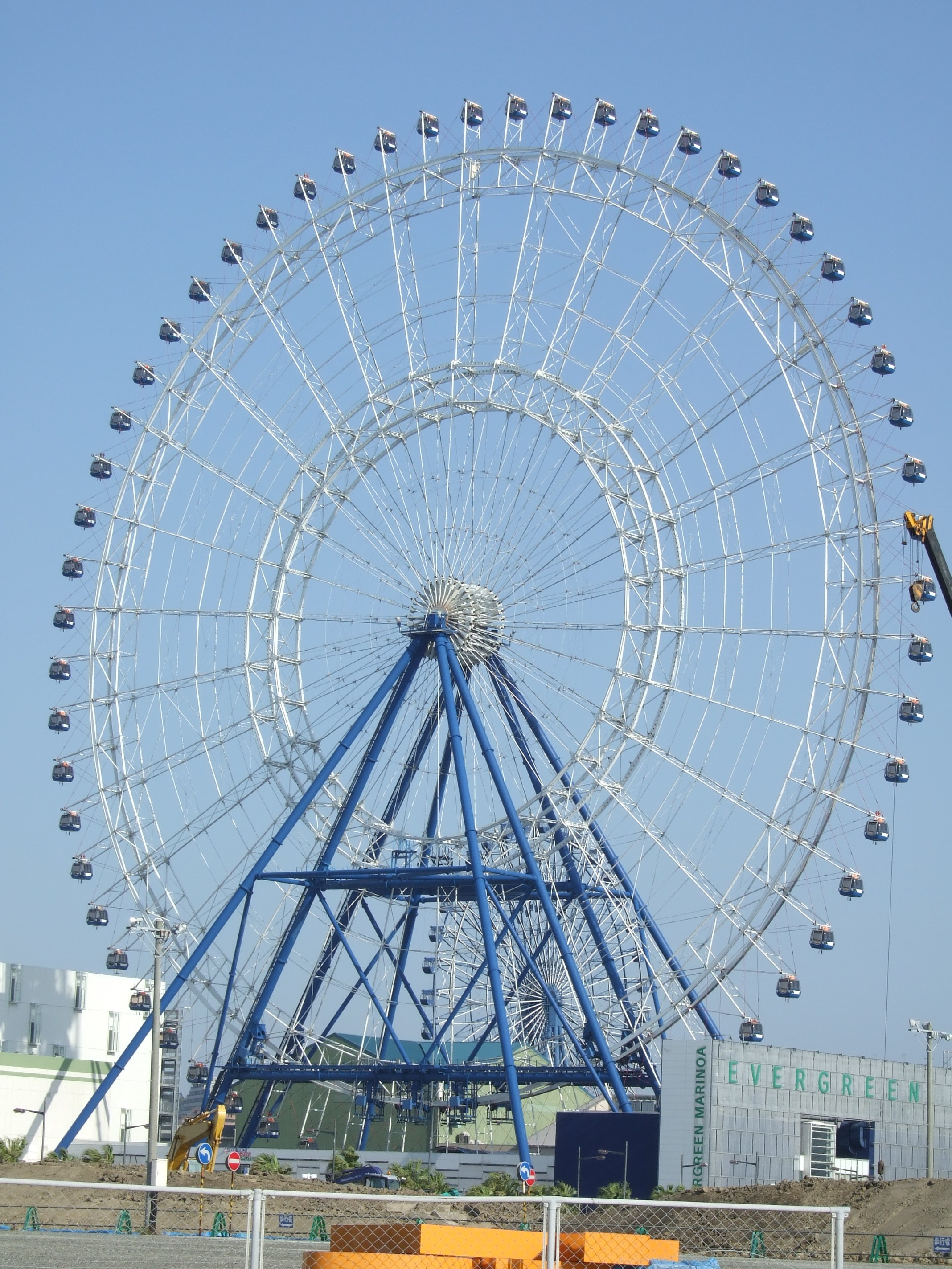 Sky Dream